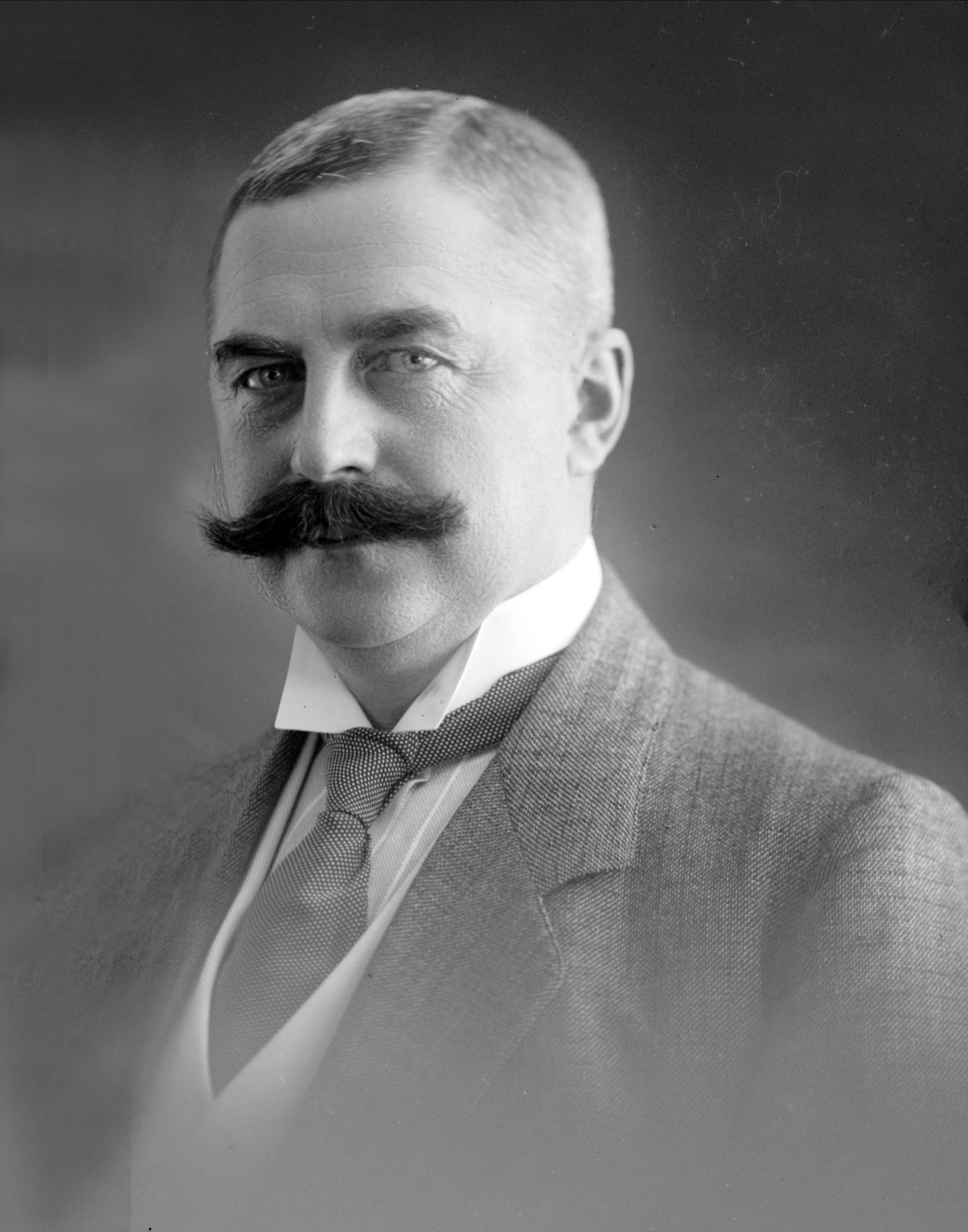 Generalmajor og statsråd Ivar Aavatsmark (1864–1947). Fotografi fra Norsk Folkemuseum, inventarnr. NFB.41773.